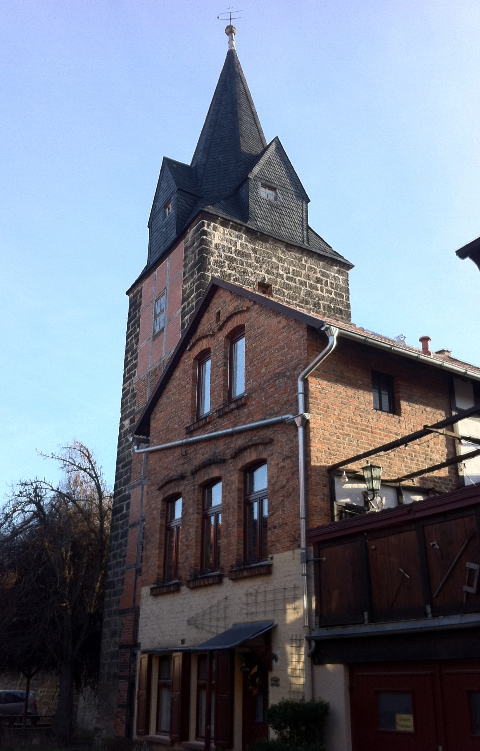 Wehrturm der Quedlinburger Stadtbefestigung, Hinter der Mauer